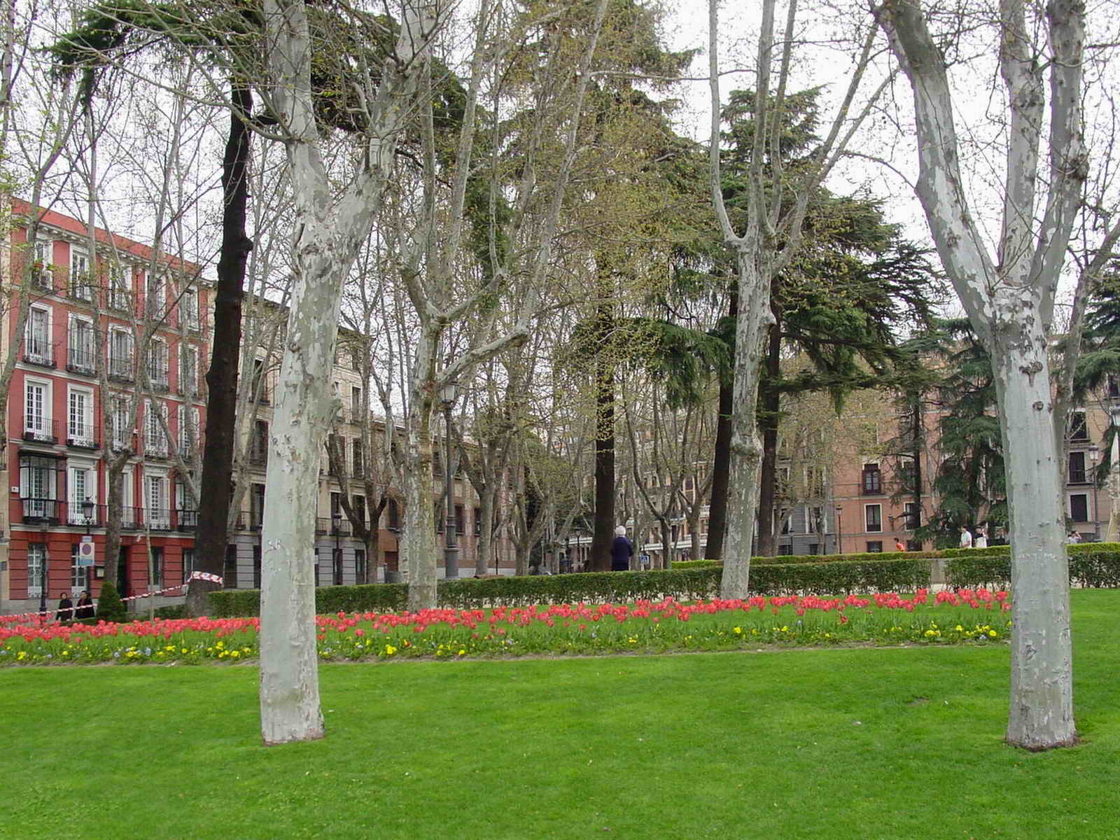 Jardines del Cabo Noval - Pl. de Oriente - Madrid - Spain.